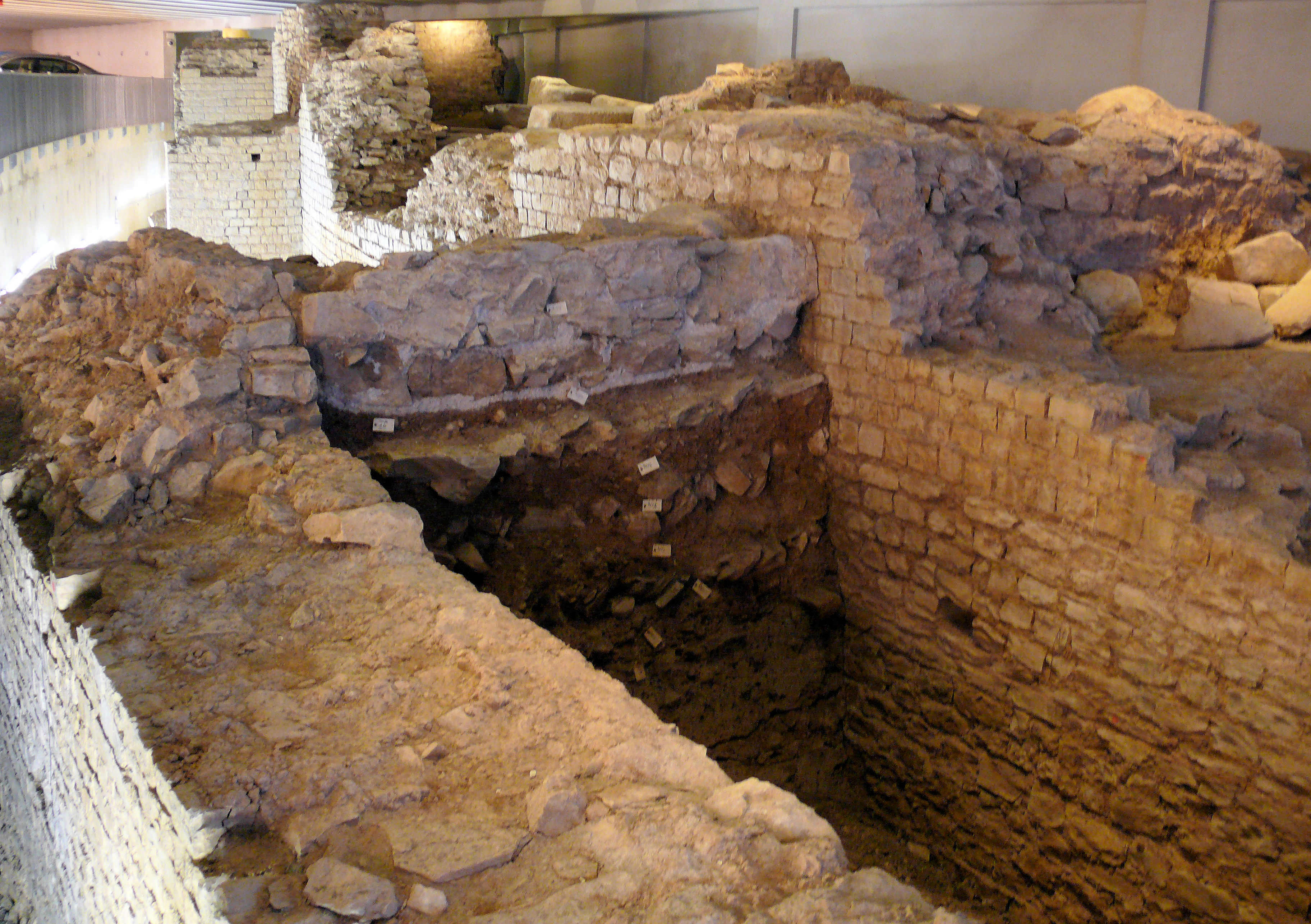 Cahors - Amphithéâtre - parking amphithéâtre allées Fénelon